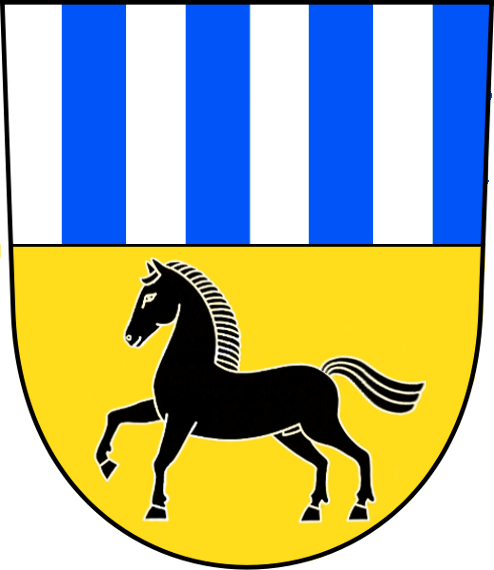 Znak obce Tochovice